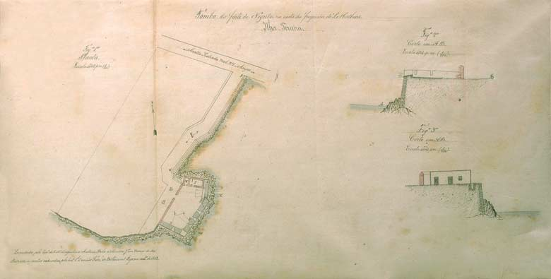 Planta do Forte do Negrito, freguesia de São Mateus da Calheta, Angra do Heroísmo, ilha Terceira, Açores, Portugal.